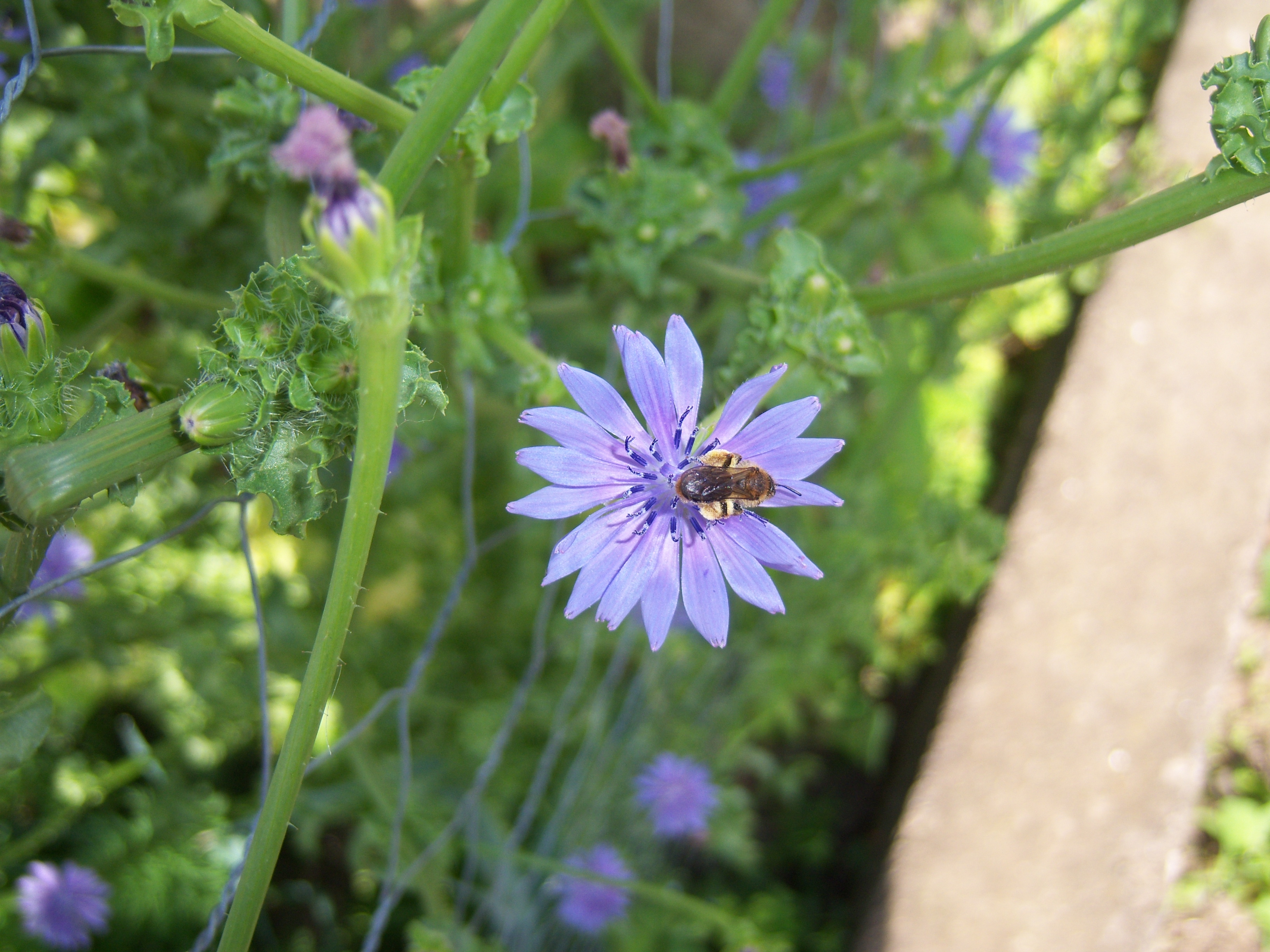 Floración y polinización de la escarola (cichorium endivia) durante el mes de junio.